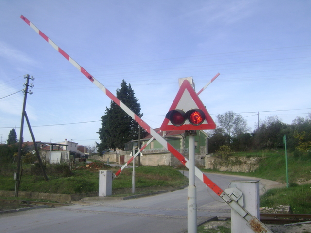 ŽCP u pulskom naselju Šijana